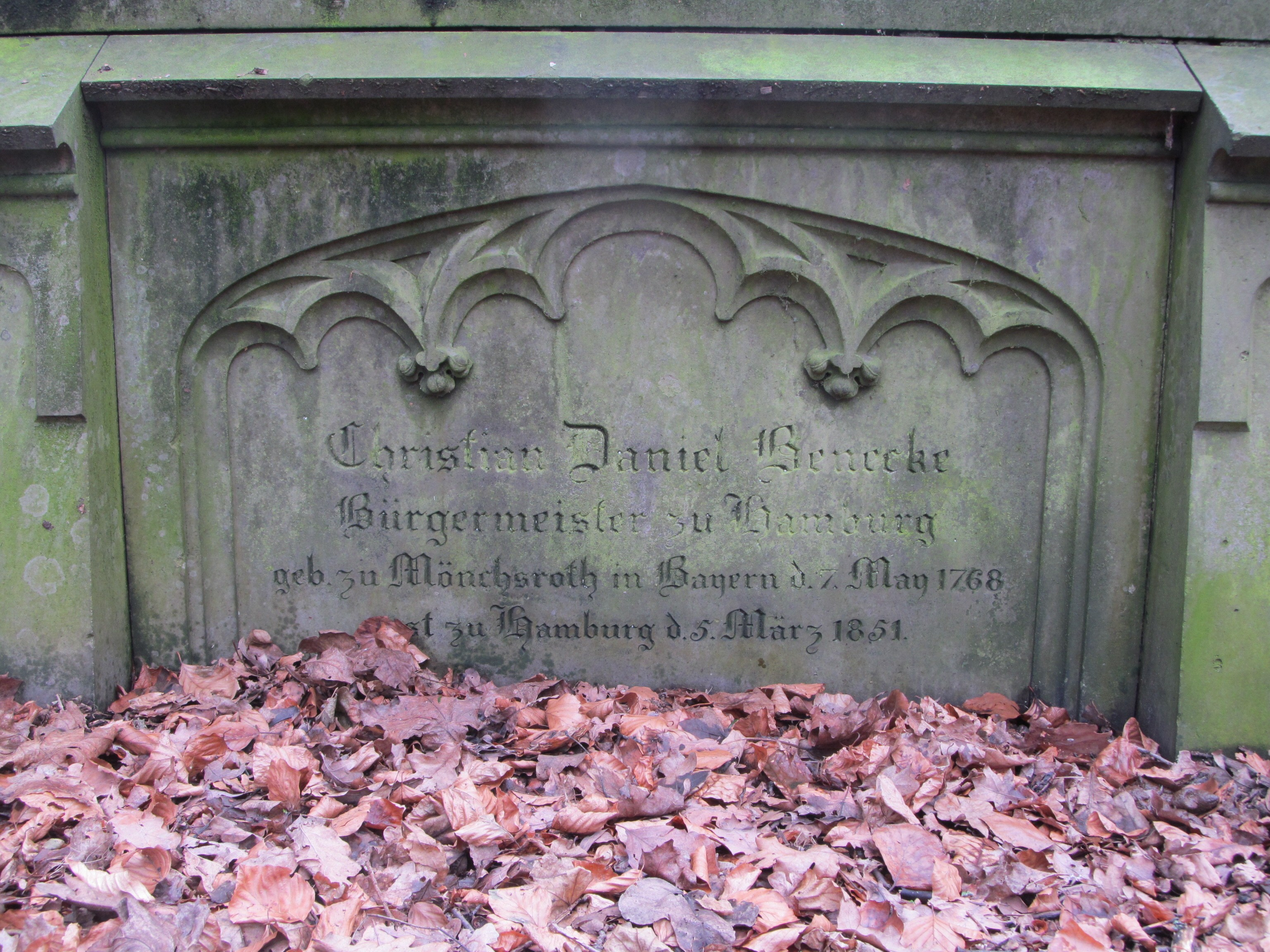 Familiengrabmal Merck im Jacobipark in Hamburg-Eilbek, Epitaph für den Hamburger Bürgermeister Christian Daniel Benecke (1768-1851)